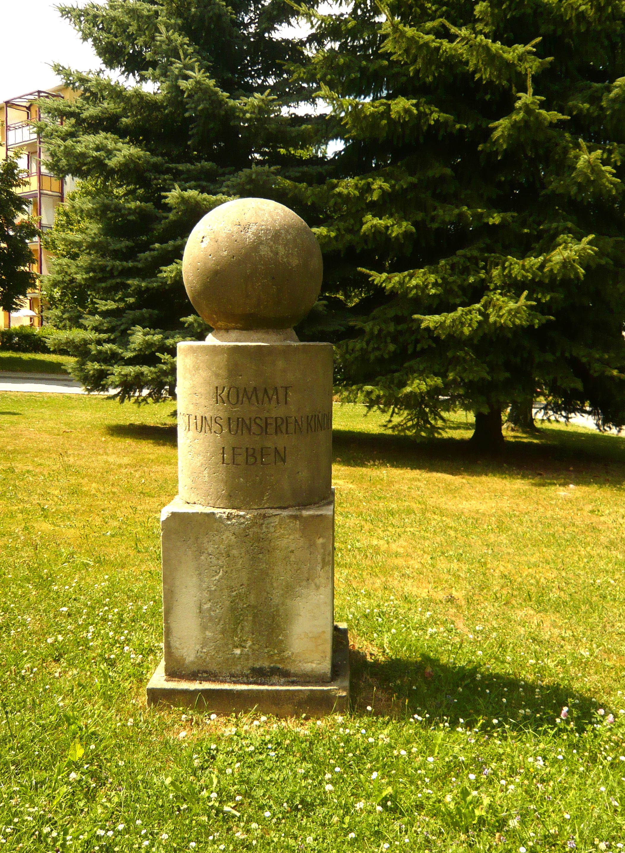 Aue (Sachsen), Denkmal auf dem Brünlasberg